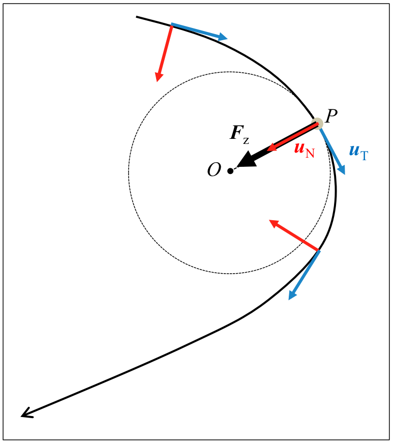 Freneten erreferentzia sistema higidura lauaren kasuan, modu grafikoan hiru puntuko bektore unitarioak adierazirik